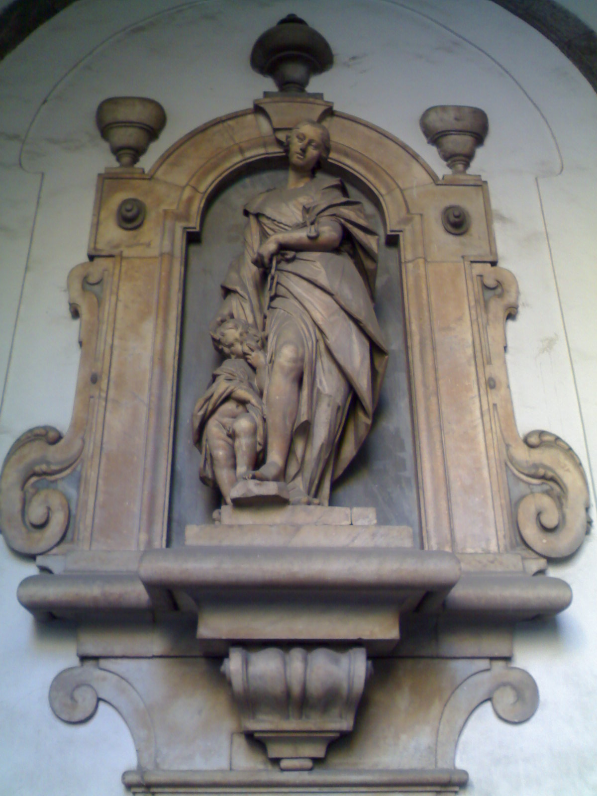 Ingresso Pio monte della misericordia (napoli)